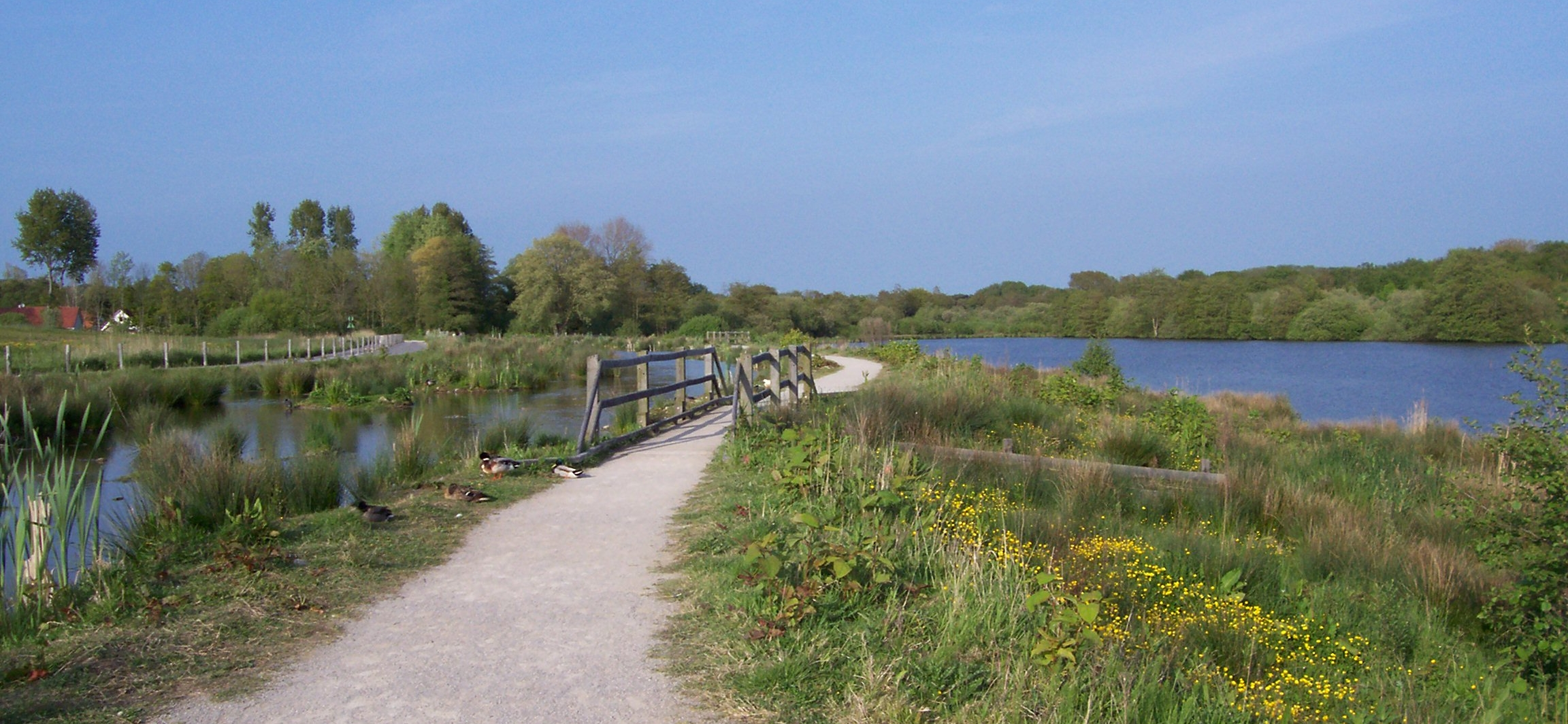 Étang et marais de Condette, Pas de Calais, France. Le site est classé pour sa qualité écologique au niveau régional. La photographie montre les aménagements réalisés en 2008 : chemin, requalification et plantations dans le marais.